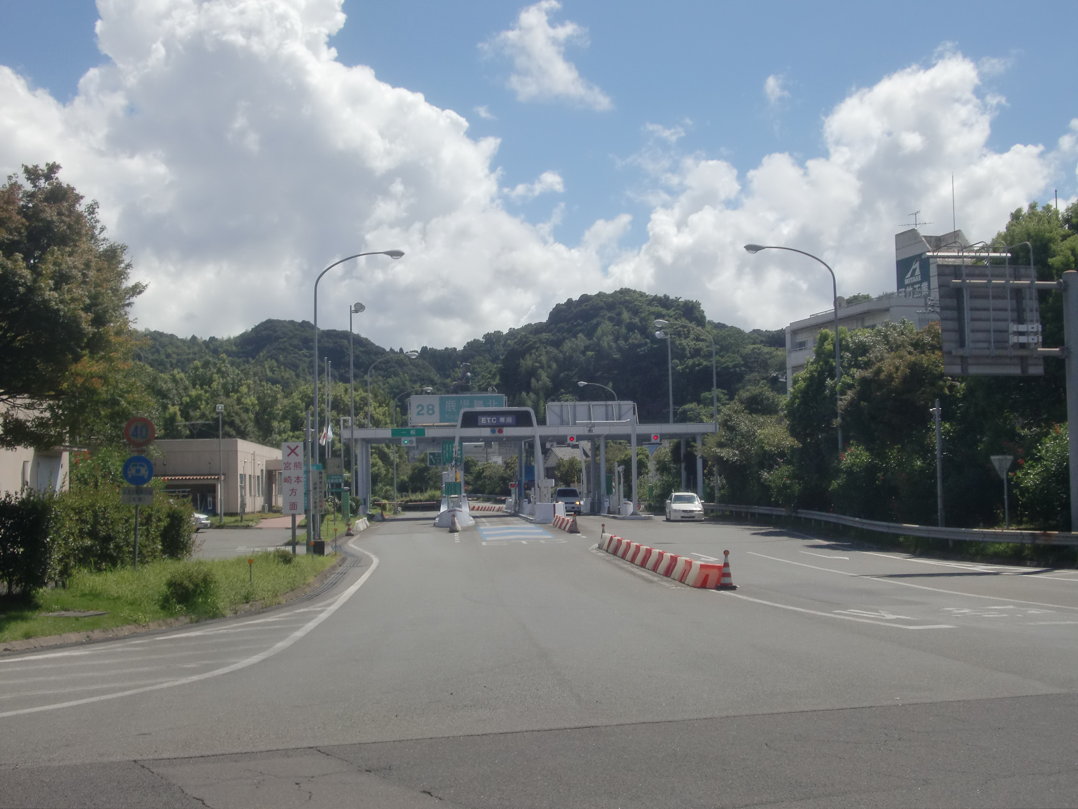 鹿児島北インターチェンジ谷山・指宿方面入り口。